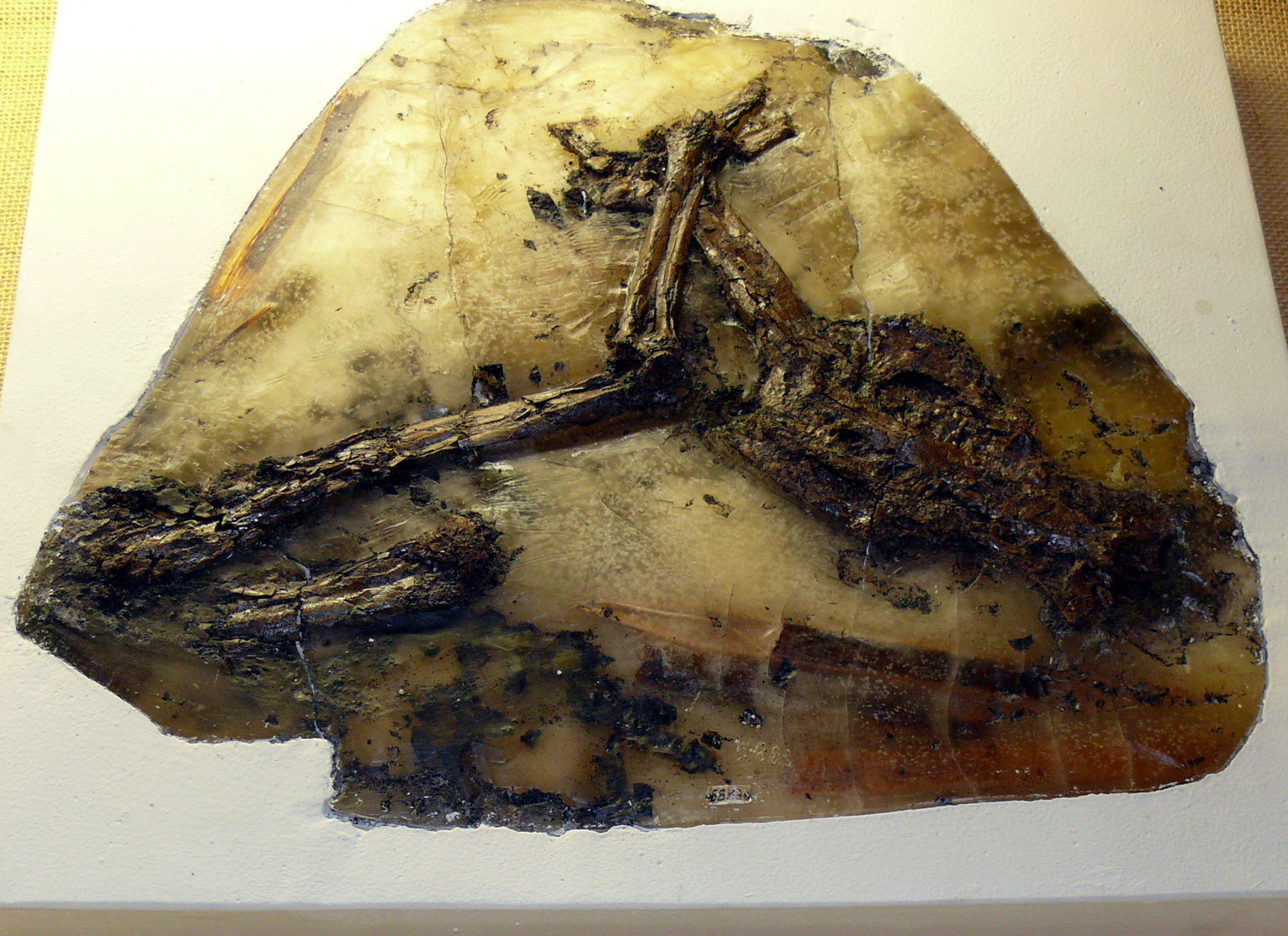 Strigogyps, ehemals Eocathartes robustus